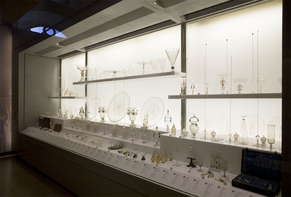 Vetrina della Sala VIII (Accademia del Cimento) del Museo Galileo, Firenze.